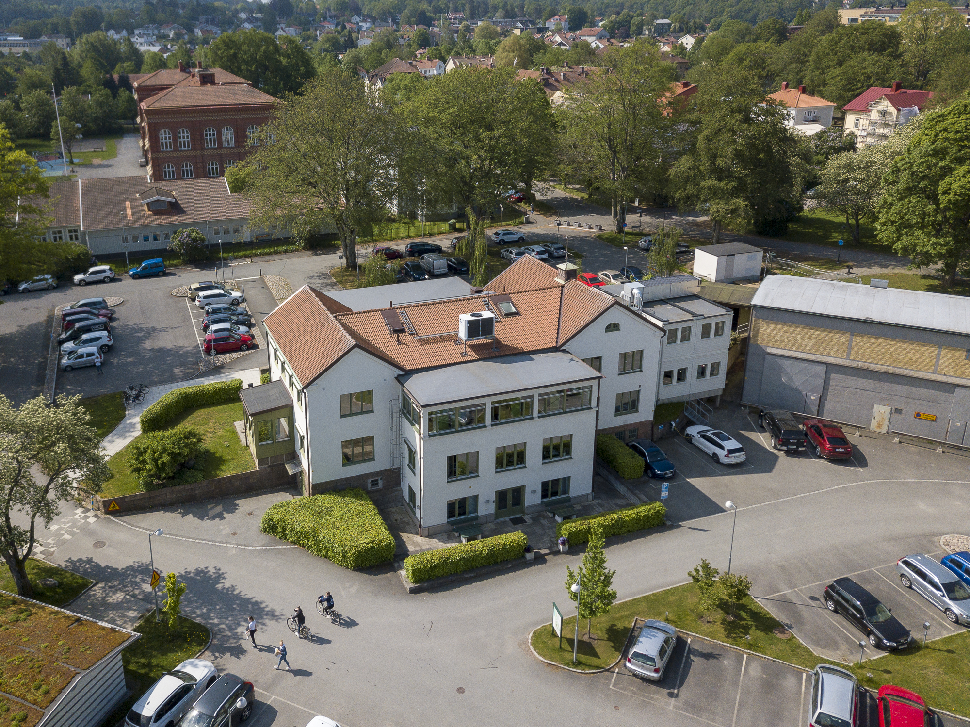 Alingsås Energi - Kundmottagning